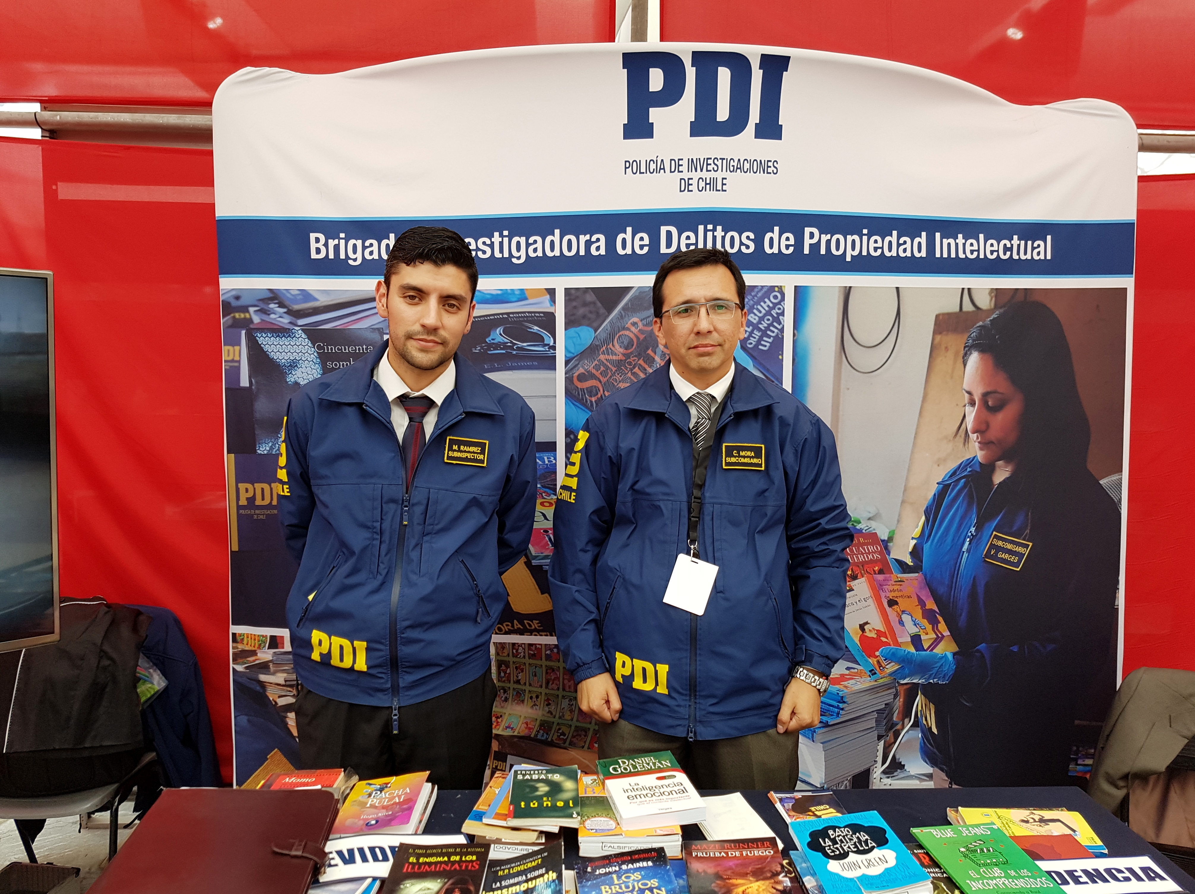 El stand de la Brigada Investigadora de Delitos de Propiedad Intelectual de la PDI en la Feria Internacional del Libro de Santiago 2017.